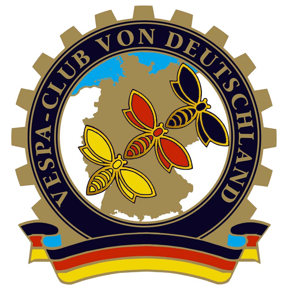 Das offizielle Logo des VCVD